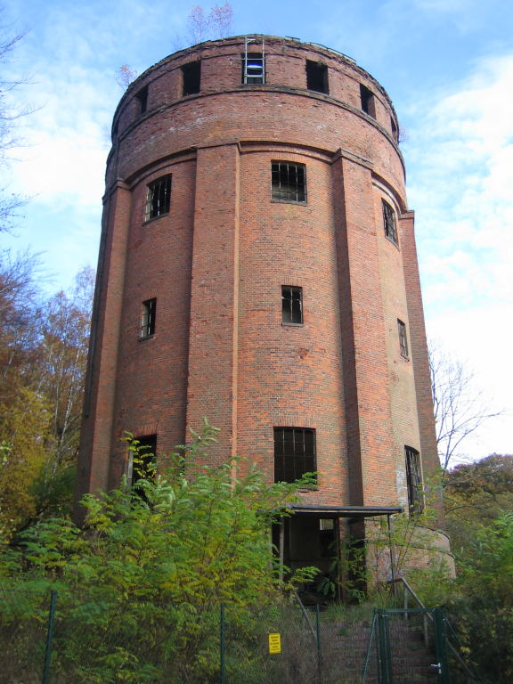 Alter Wasserturm auf dem Gelände der ehemaligen Geesthachter Dynamitfabrik von Alfred Nobel